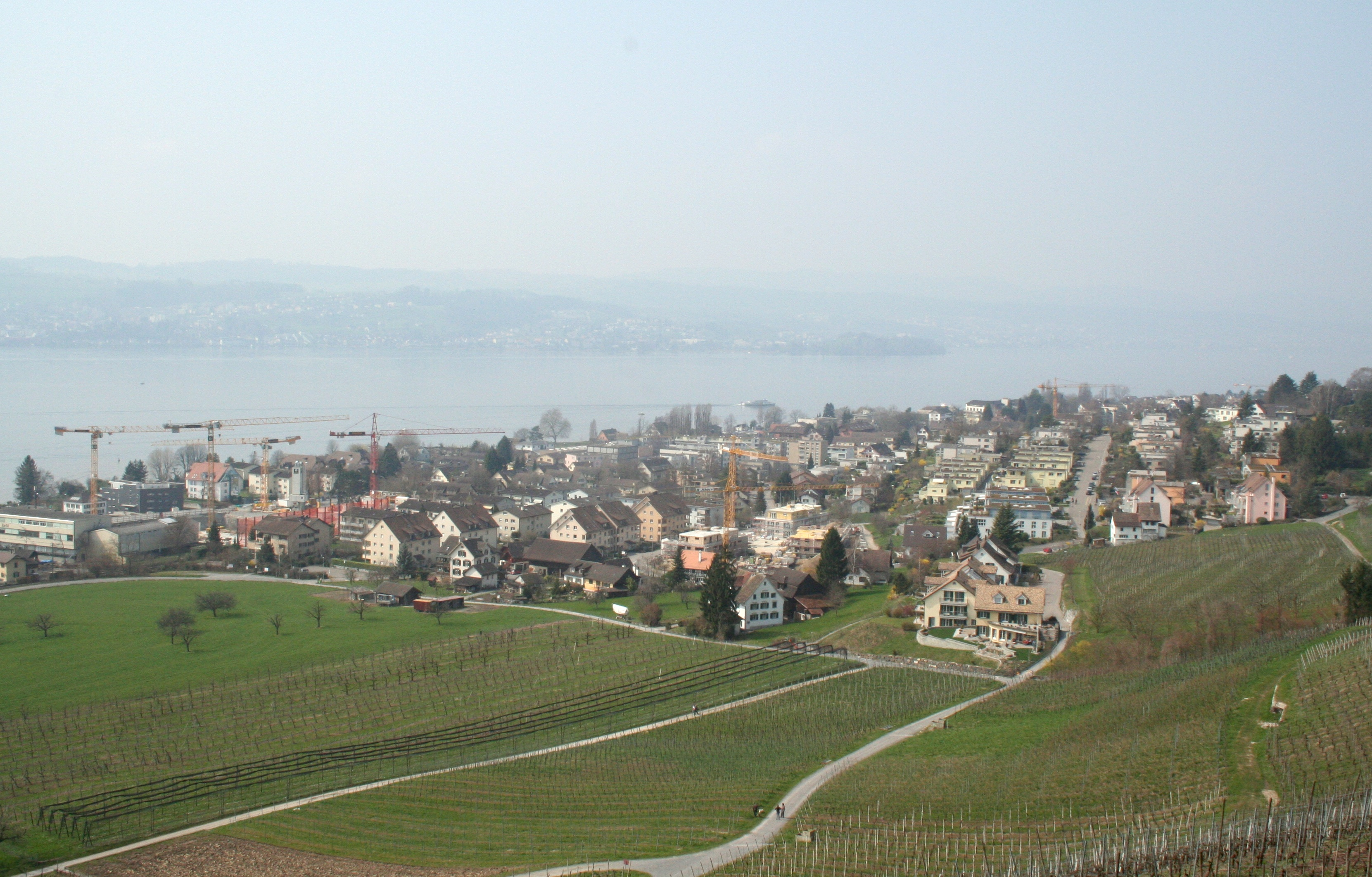 Blick von der Stäfner Buechhalde über Männedorf und den Zürichsee gegen die Halbinsel Au in diesigem Licht.